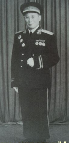 韩卫民获独立自由勋章